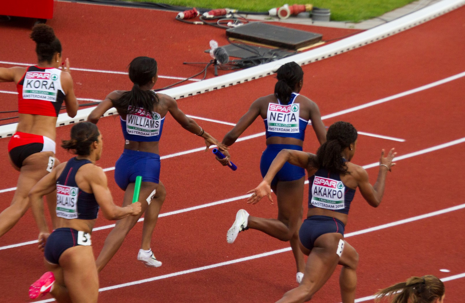 494 reeksen 4x100m dames